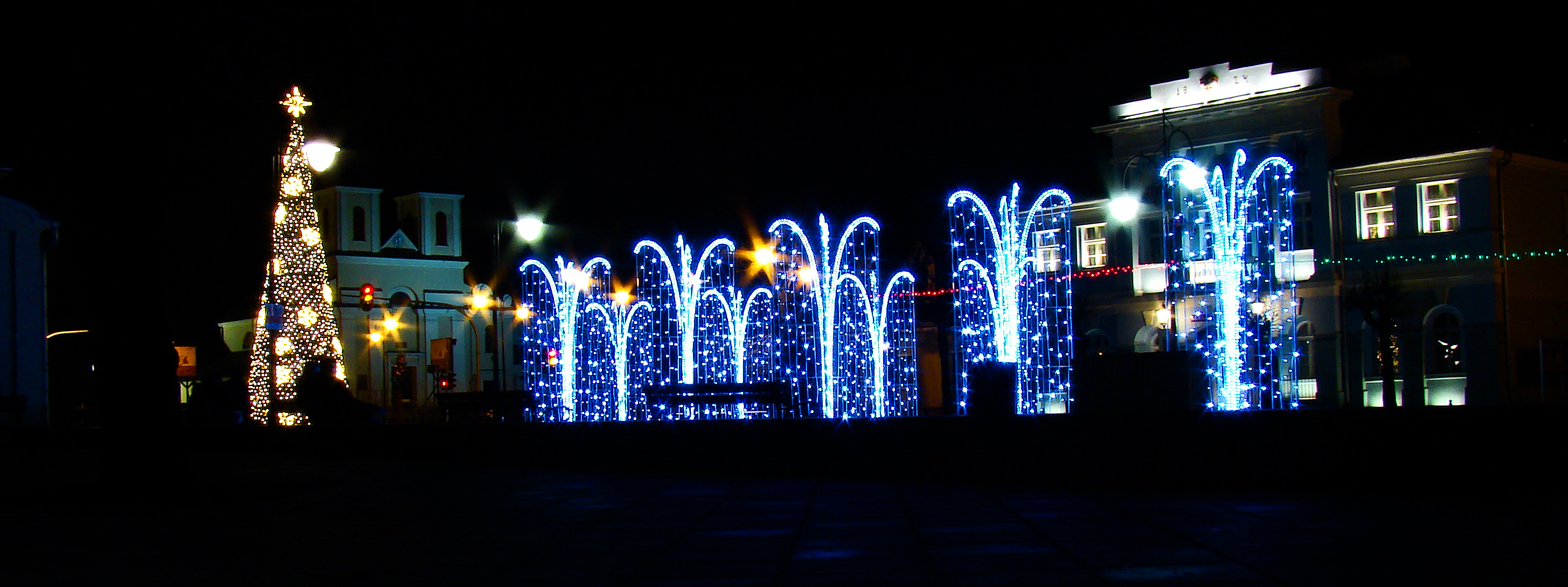 Plac Tadeusza Kościuszki w Aleksandrowie Łódzkim (powiat zgierski, województwo łódzkie), Polska